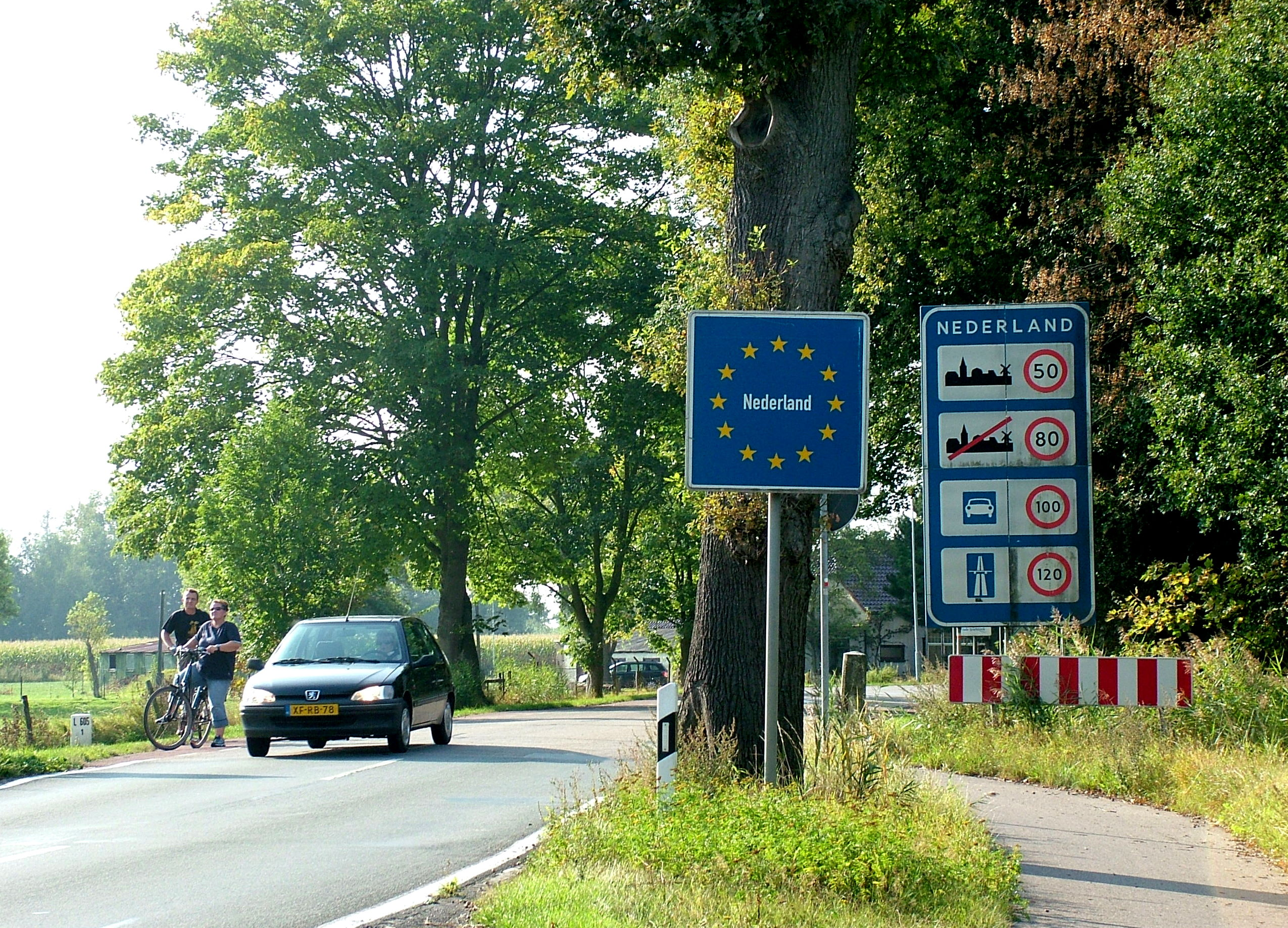 Anholt (Isselburg), Grenze zu den Niederlanden, Straße Dwarsefeld